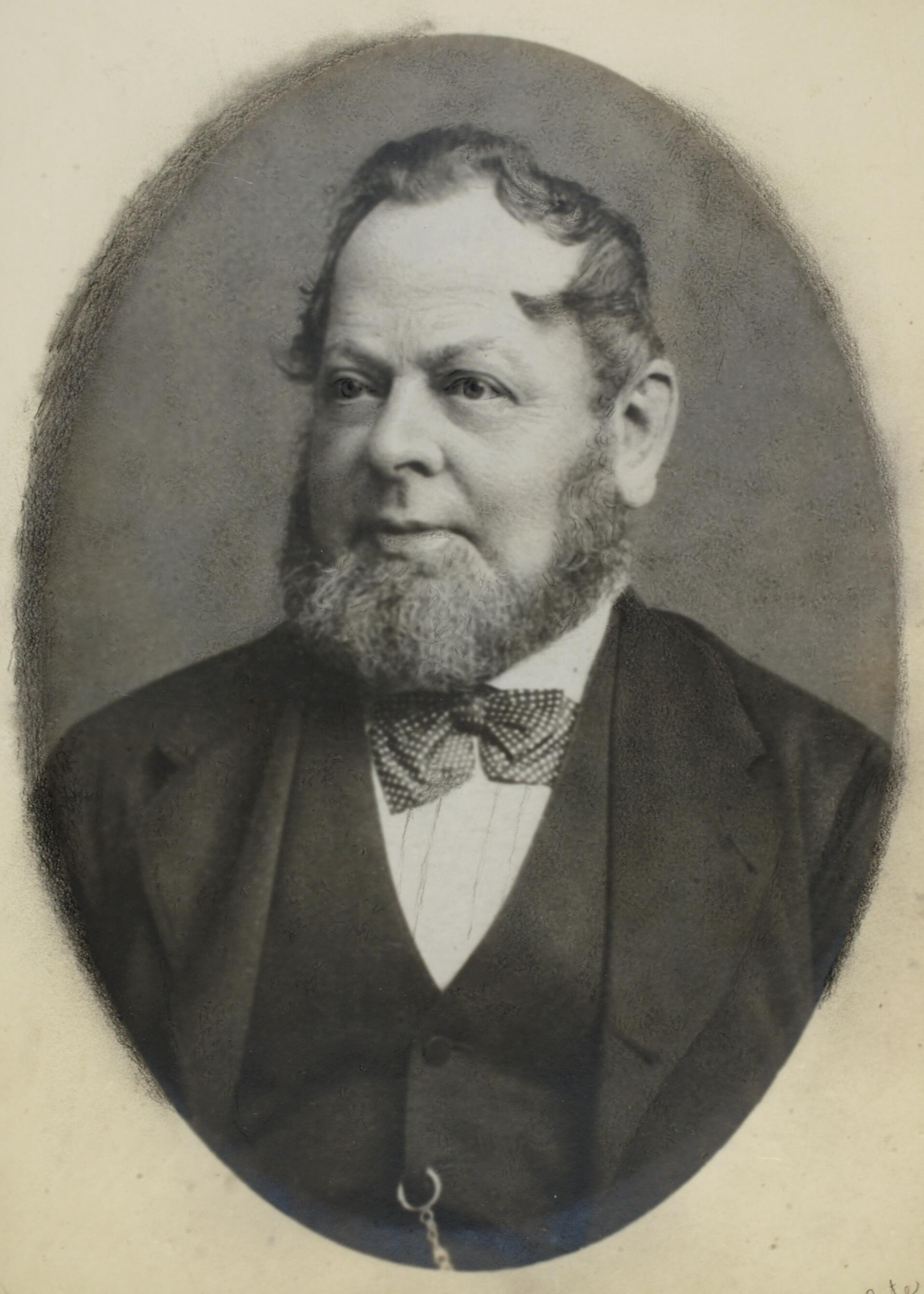 Portret van Antonij Johan ten Cate (1822-1886)